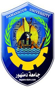 الشعار الخاص بجامعة دمنهور